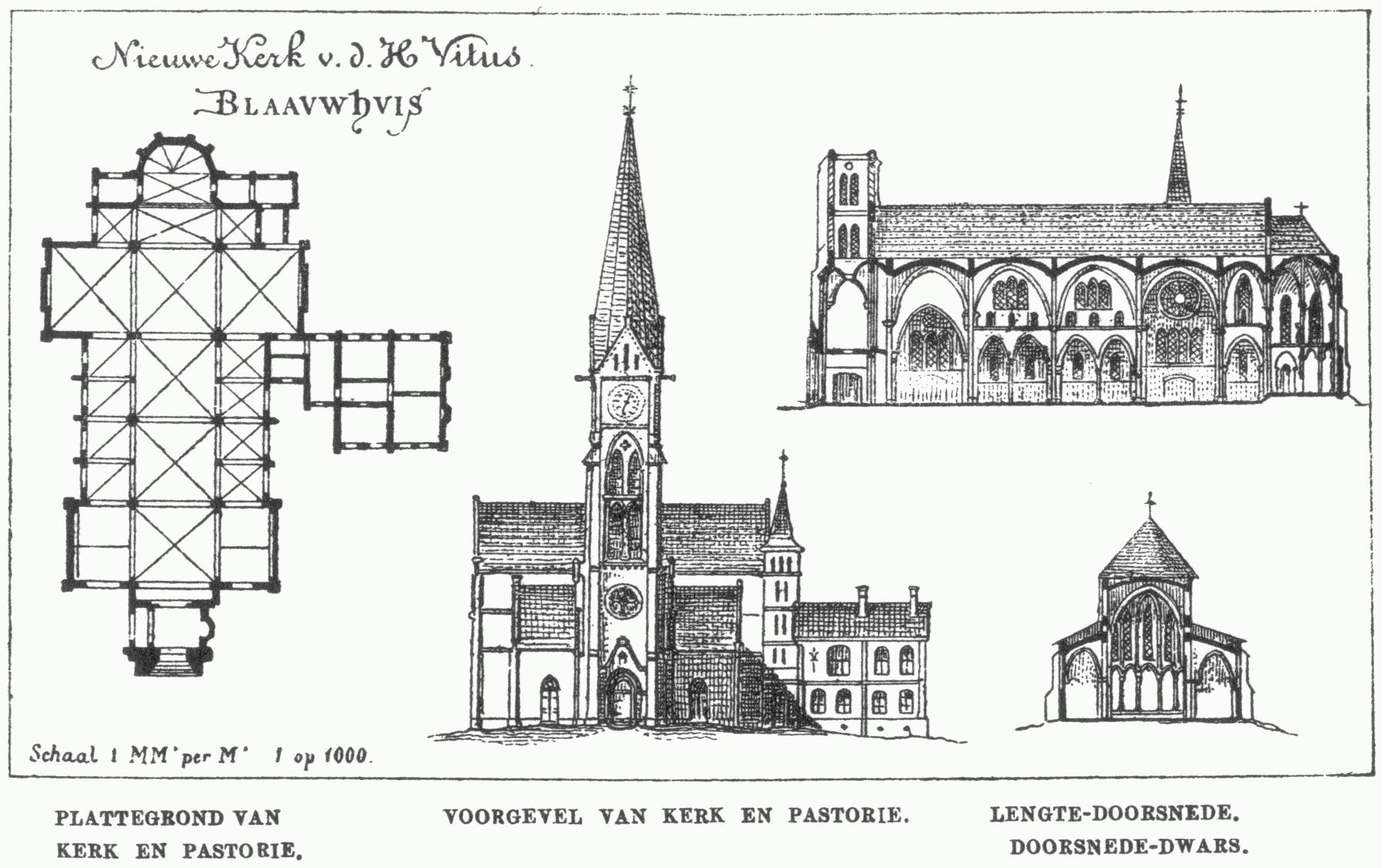 Blauhûs, Sint-Vitustsjerke